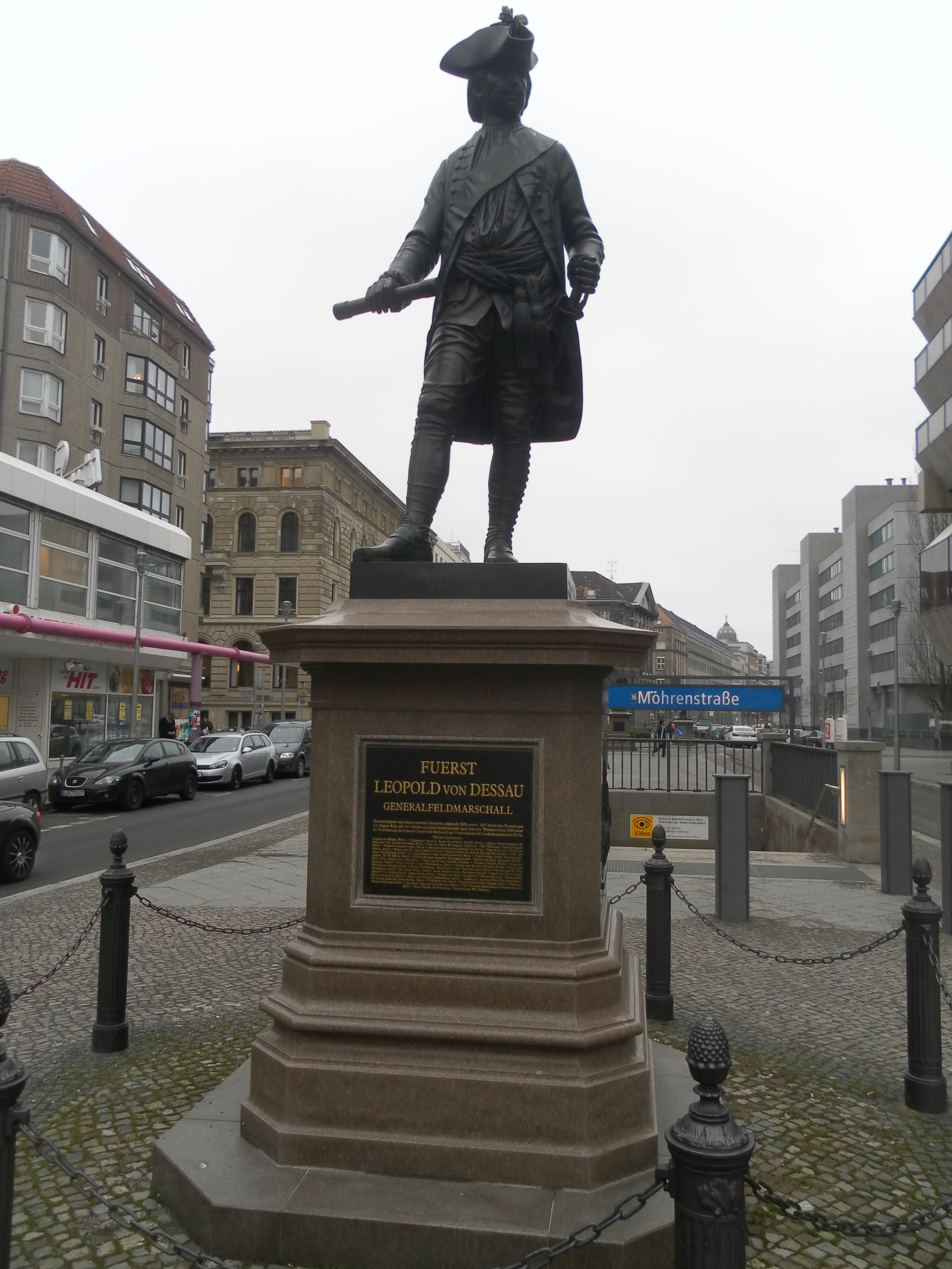 Denkmal des Fürsten Leopold von Dessau am Berliner Wilhelmplatz